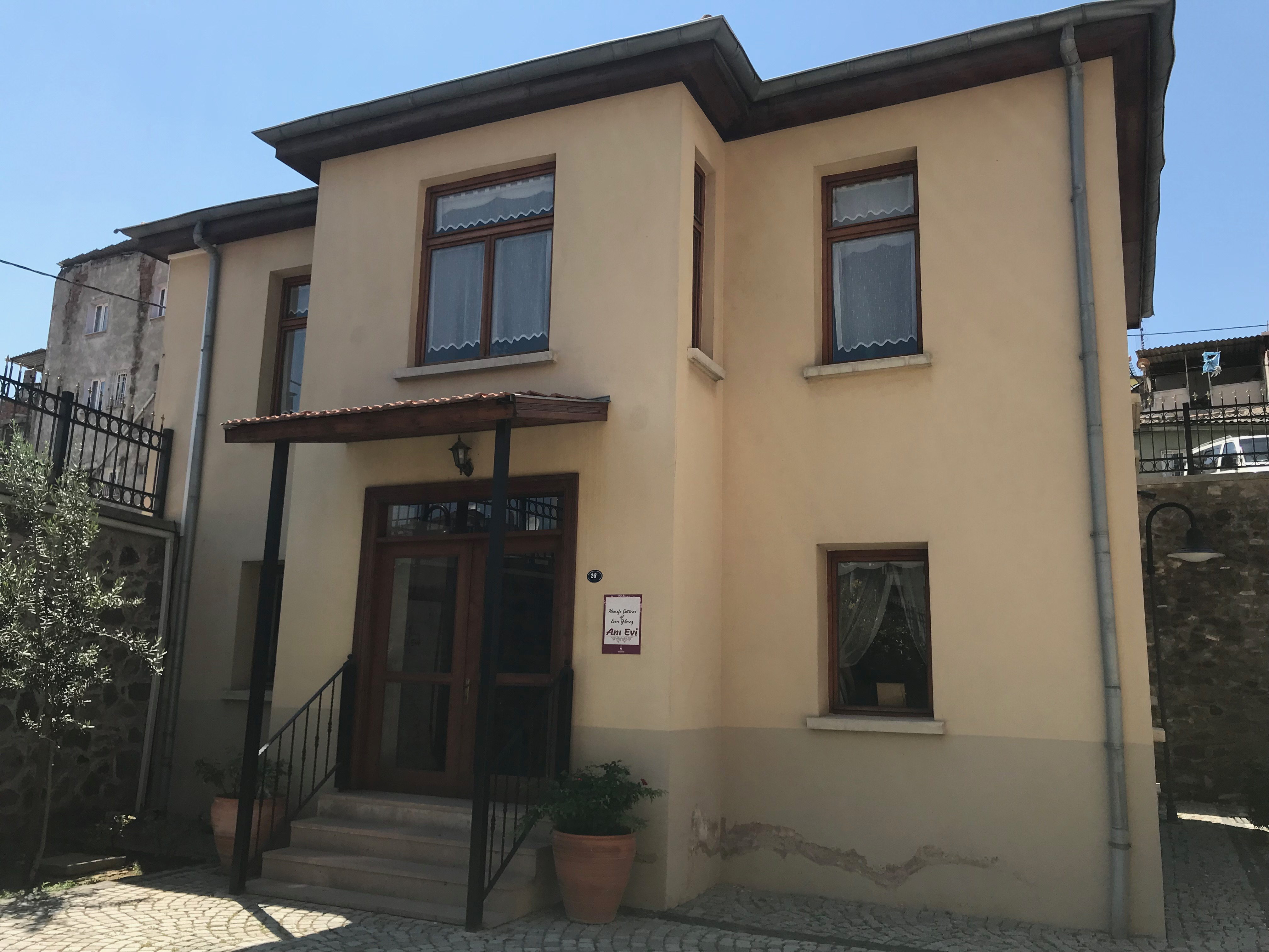 İzmir, Türkiye'deki Aziz Vukolos Kilisesi'nin eklentisinde yer alan Hanife Çetiner ve Esin Yılmaz Anı Evi.